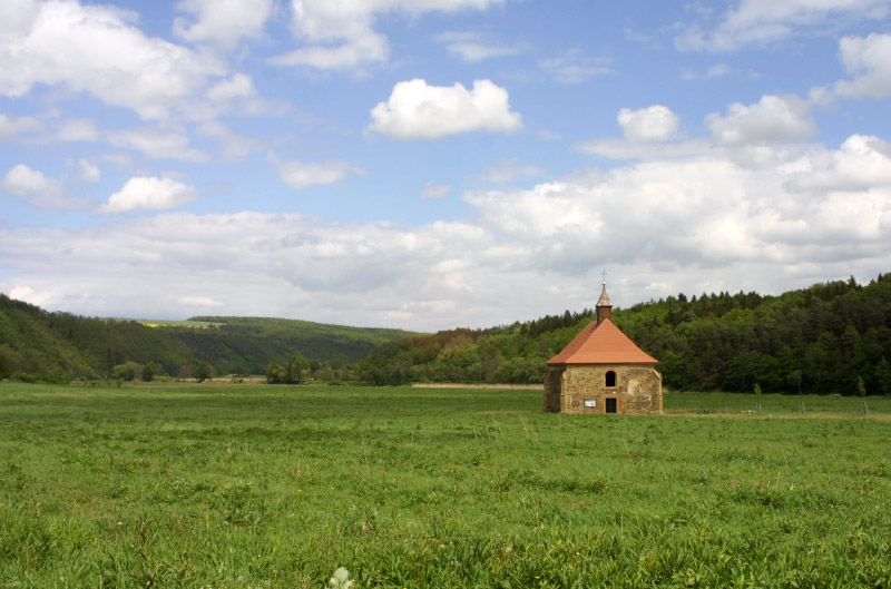 kostela sv. Petra a Pavla v Dolanech v údolní nivě Berounky.